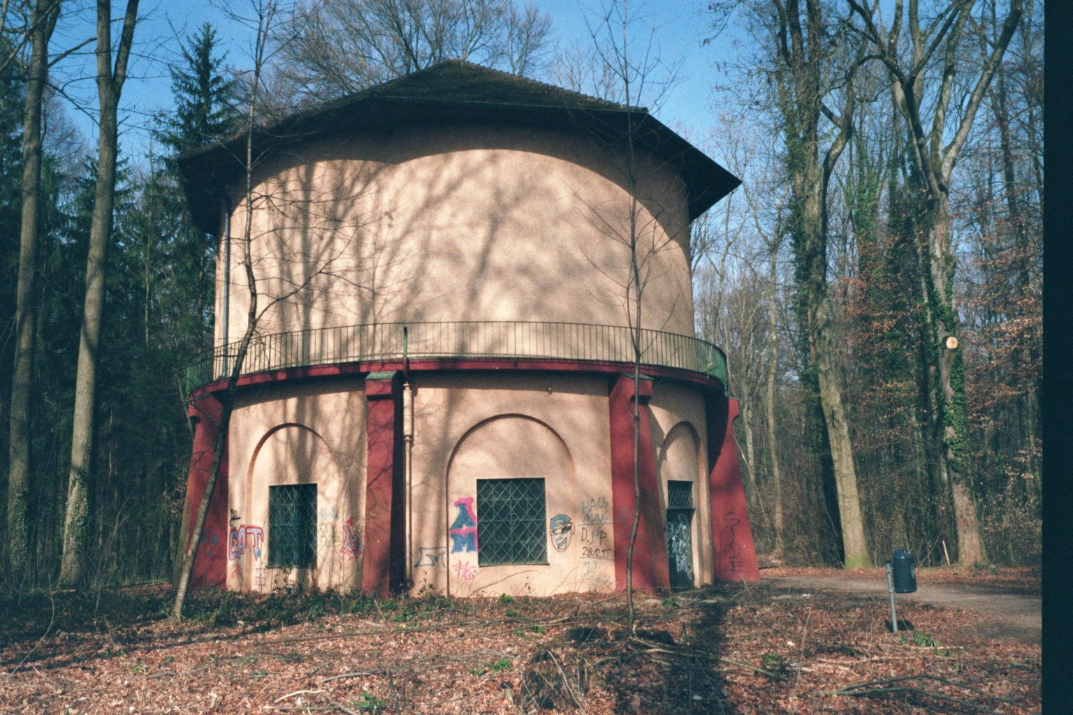 Wasserturm im Riedlewald, Friedrichshafen. Erbaut: 1922. Standort: Riedlewald - Süd-Ost-Teil / Margaretenstraße